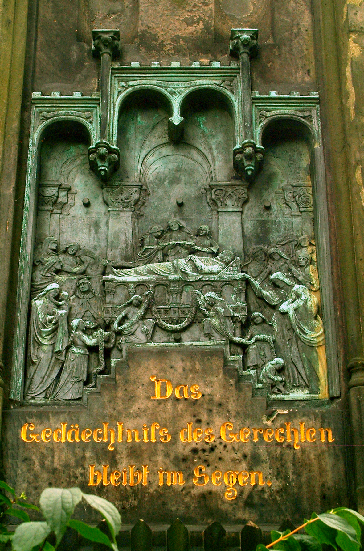 Rückseitiges Trauerrelief am Grabmals von Friedrich Krancke ...